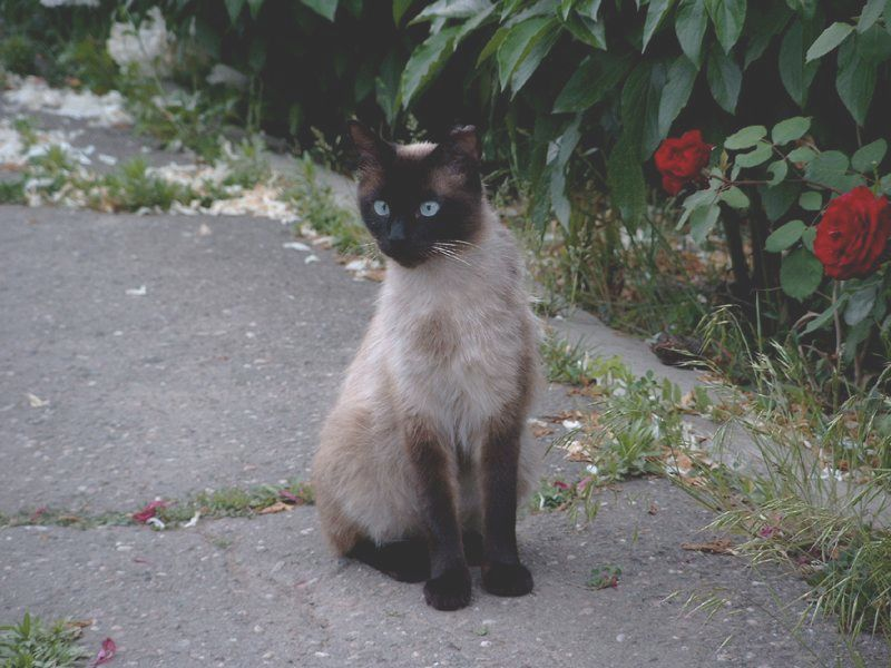 Netty, my siamese